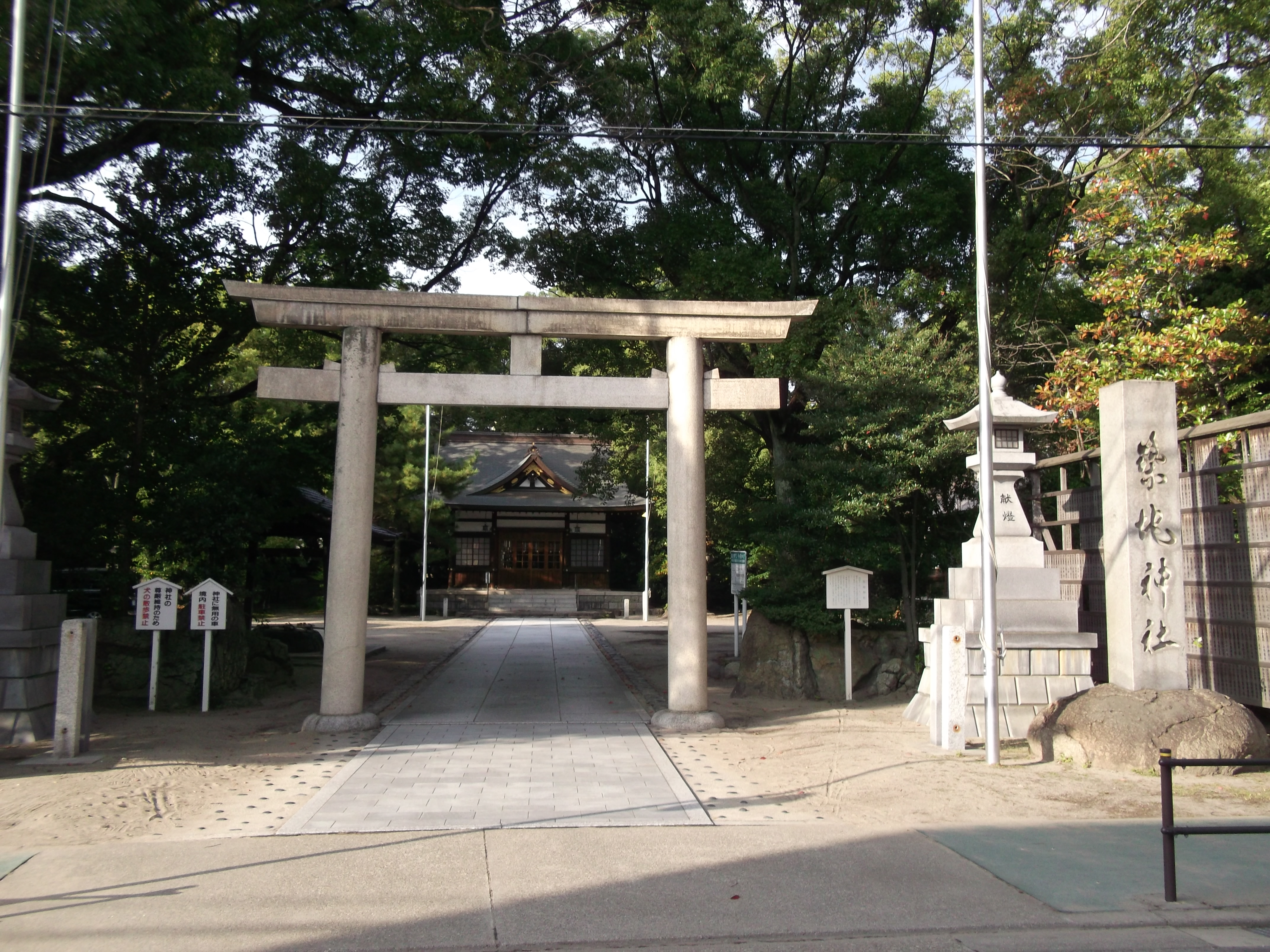 名古屋市港区千鳥の築地神社を南側公道より撮影